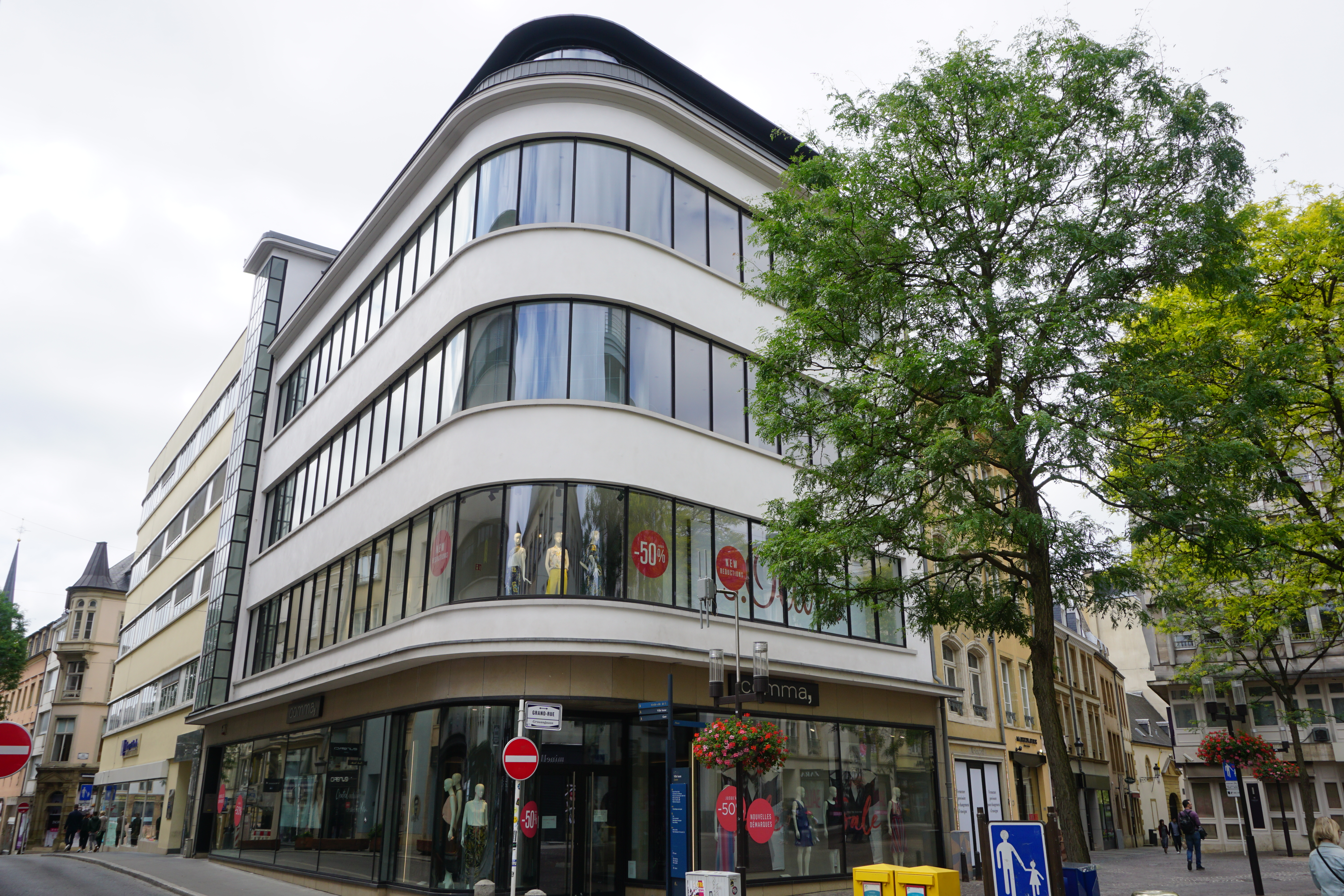 Luxembourg. Ancien magasin "À la Bourse"; immeuble construit en 1934 par Léon Leclerc.